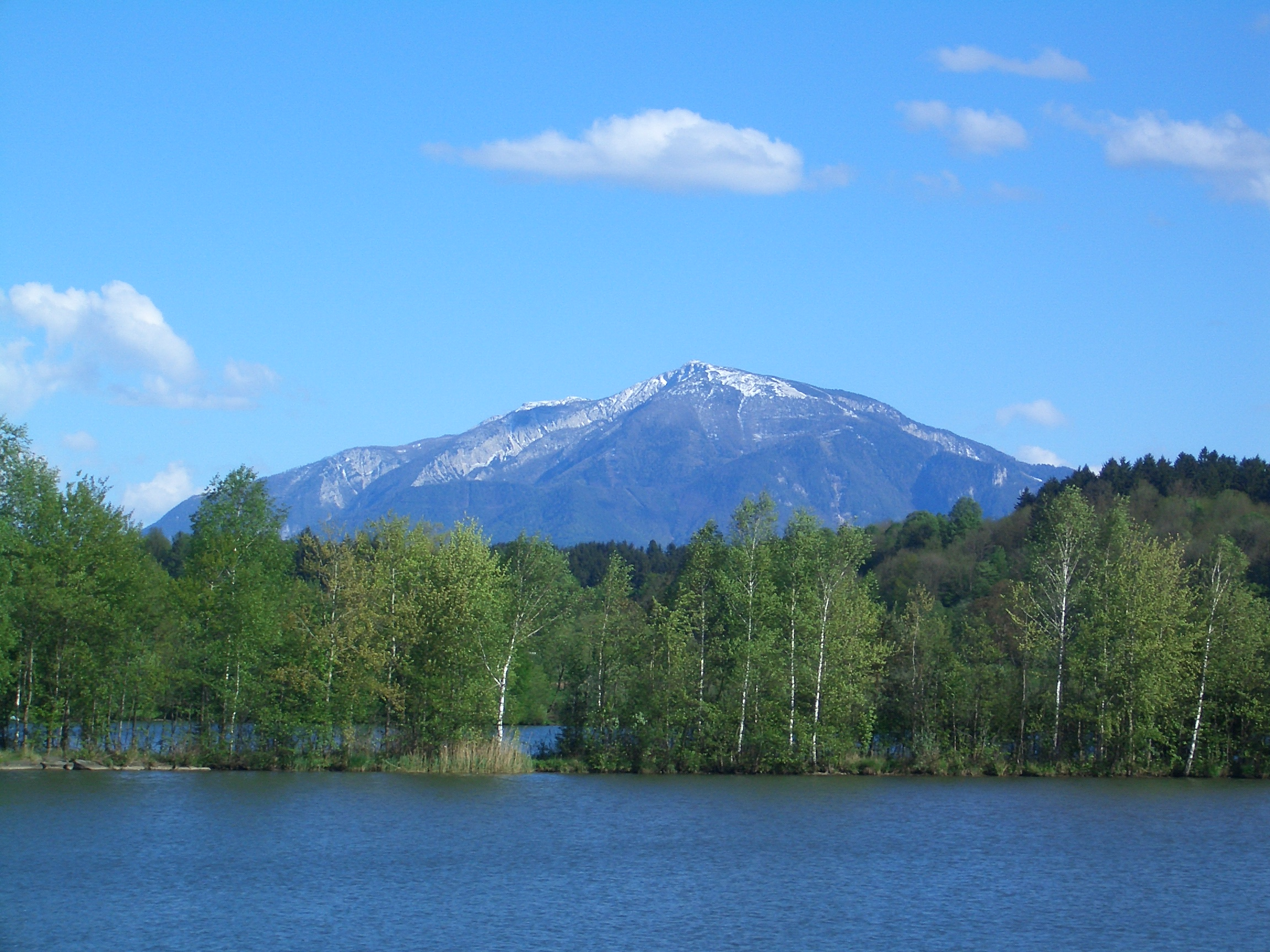 Das Bergmassiv Petzen vom Völkermarkter Stausee aus fotografiert (im Vordergrund zu sehen).